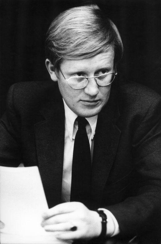 VVD-fractievoorzitter Hans Wiegel kijkt over zijn bril, op zijn plaats in de Tweede Kamer, bij het begin van de algemene beschouwingen over de begroting. Den Haag ('s-Gravenhage), 12 oktober 1971.